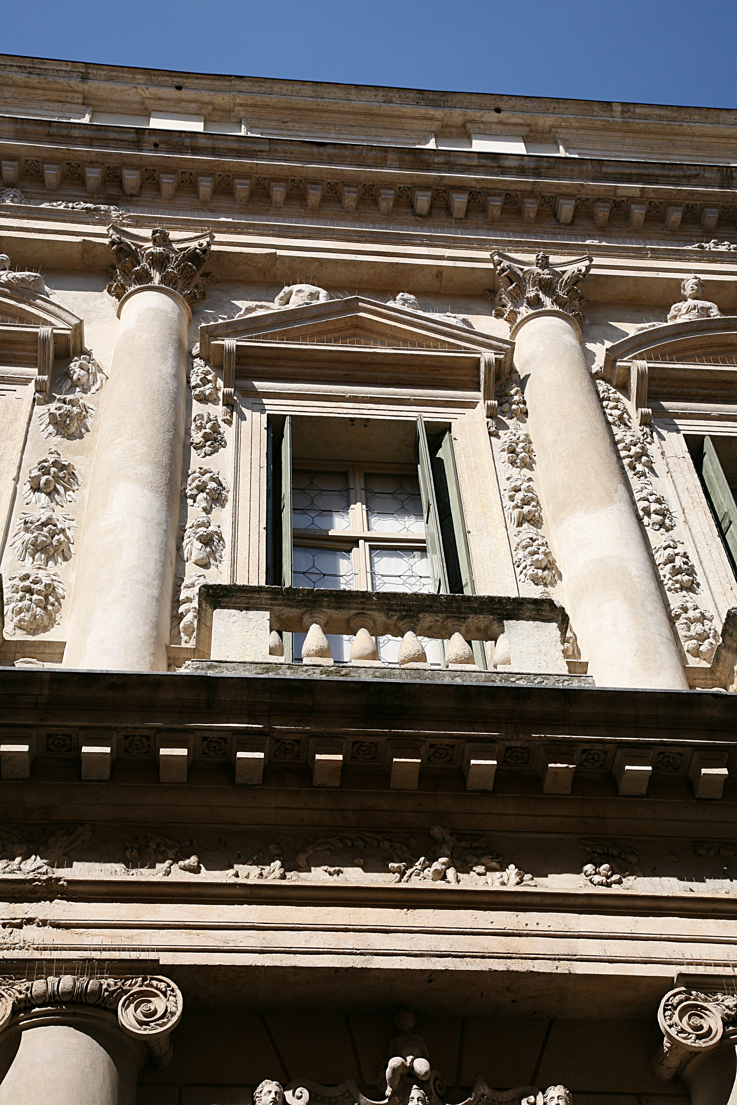 Palazzo Barbaran Da Porto in Vicenza